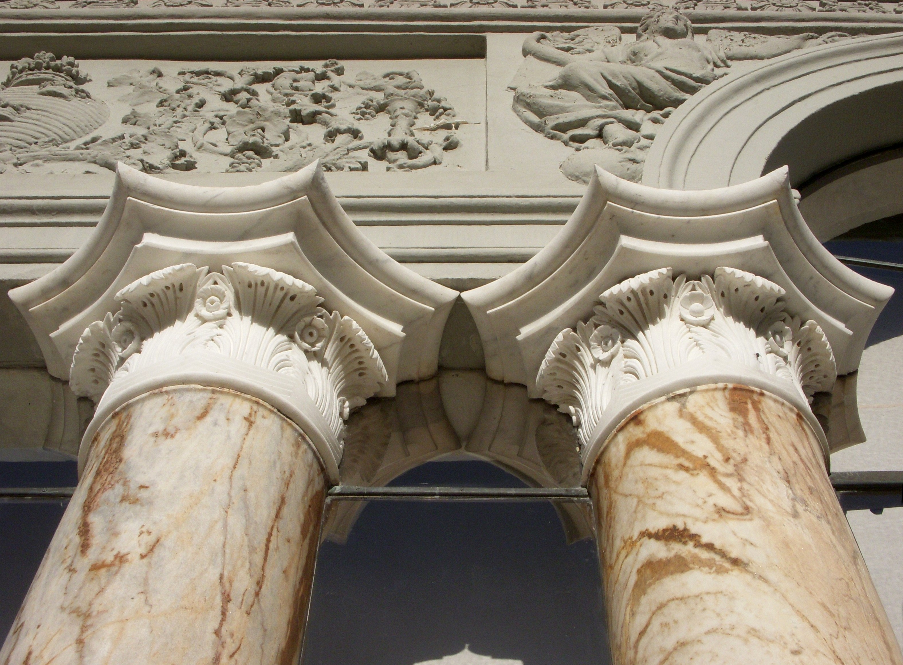 Gustav III:s paviljong i Hagaparken, fasaddetalj